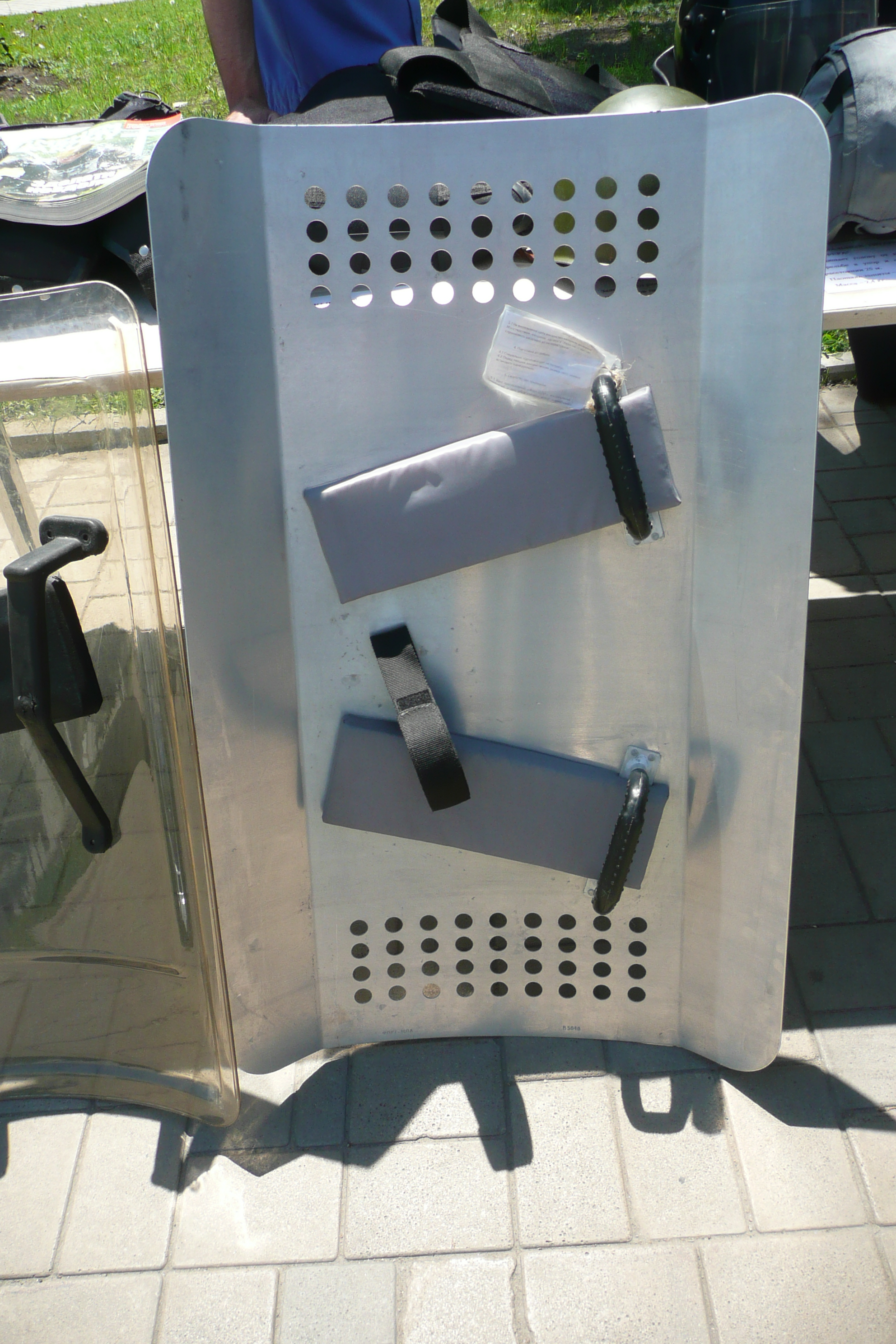 День защиты детей в Донецке